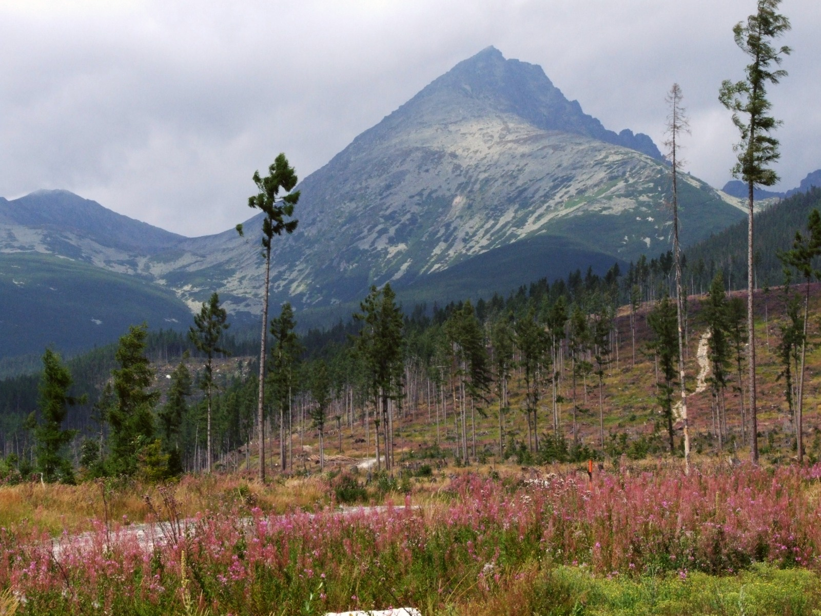 Kończysta i Dolina Stwolska